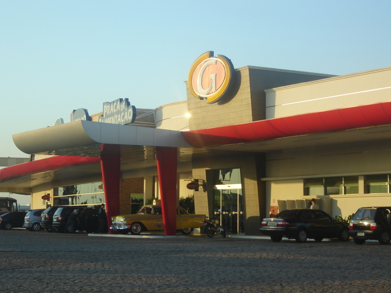 Posto da Rede Graal em Santa Bárbara d'Oeste